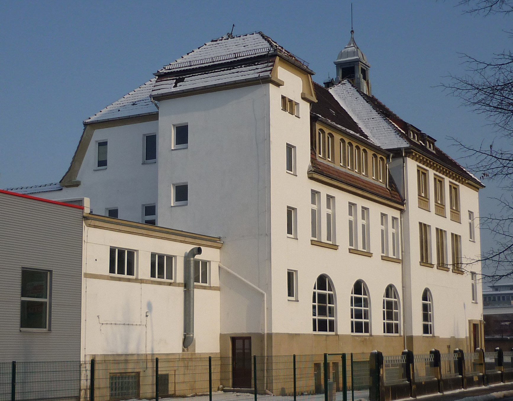 Gebäude Würzburger Straße 9 in Dresden-Plauen (Dr. Doerr Feinkost GmbH & Co. KG)